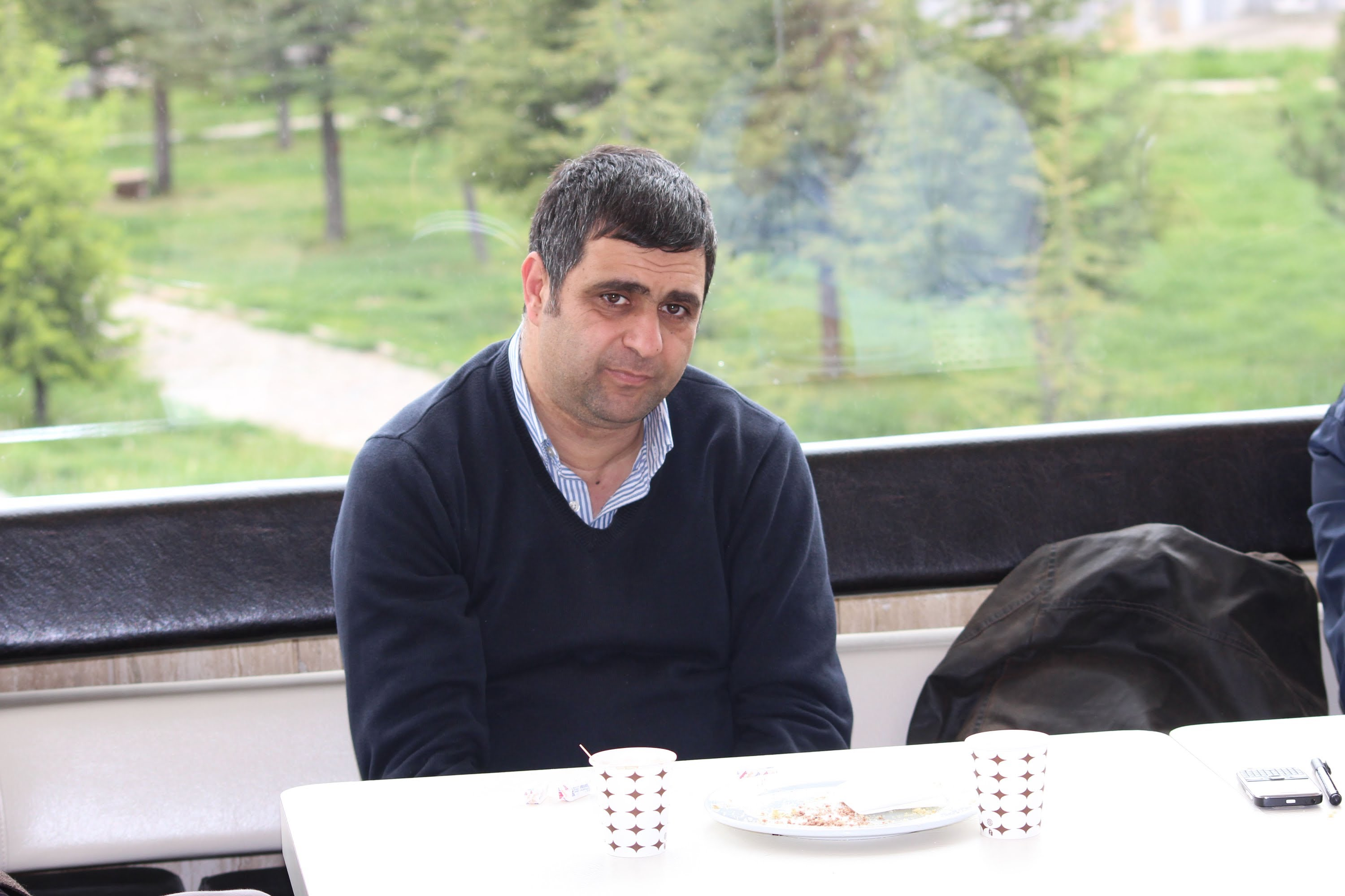 Ergi Deniz ÖZSOY